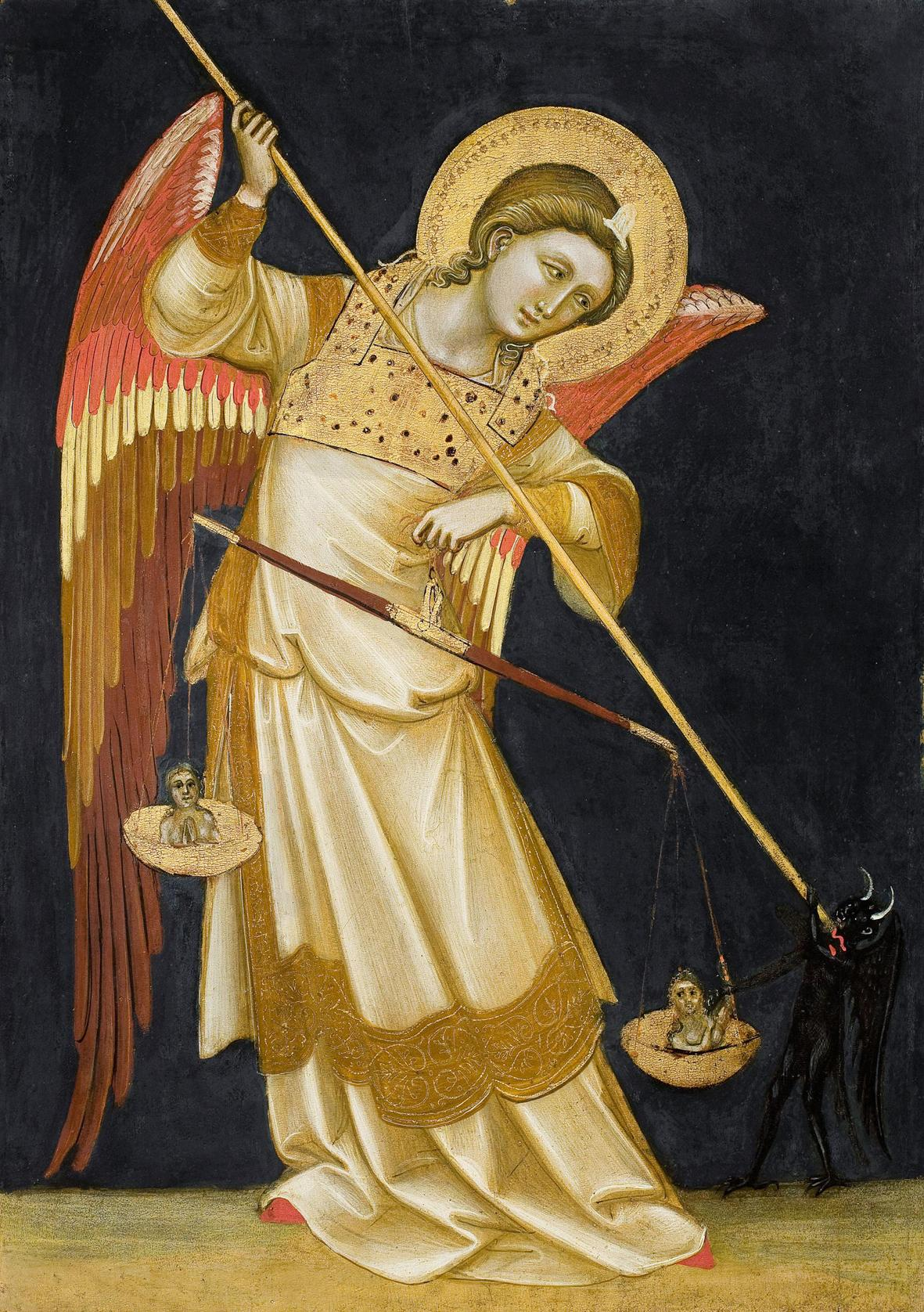 Gemälde aus der Kapelle des Palazzo Carrara in Padua, Szene: Engel